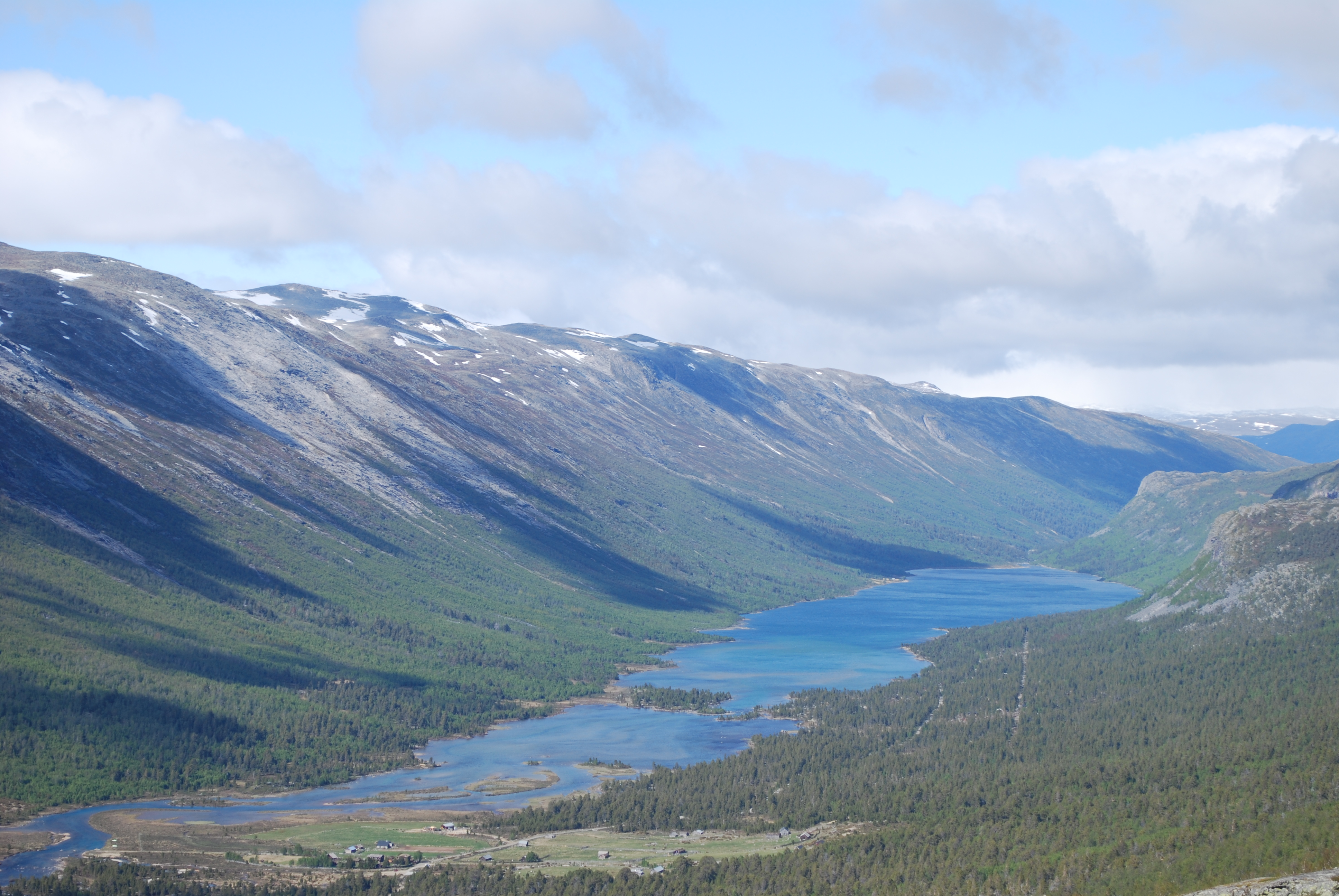 Sota og Liavatnet i Skjåk kommune i Oppland, med Stutarberget til venstre og Nørdre Randsverkgrove til høyre. Sota og Sota Sæter nede til venstre.